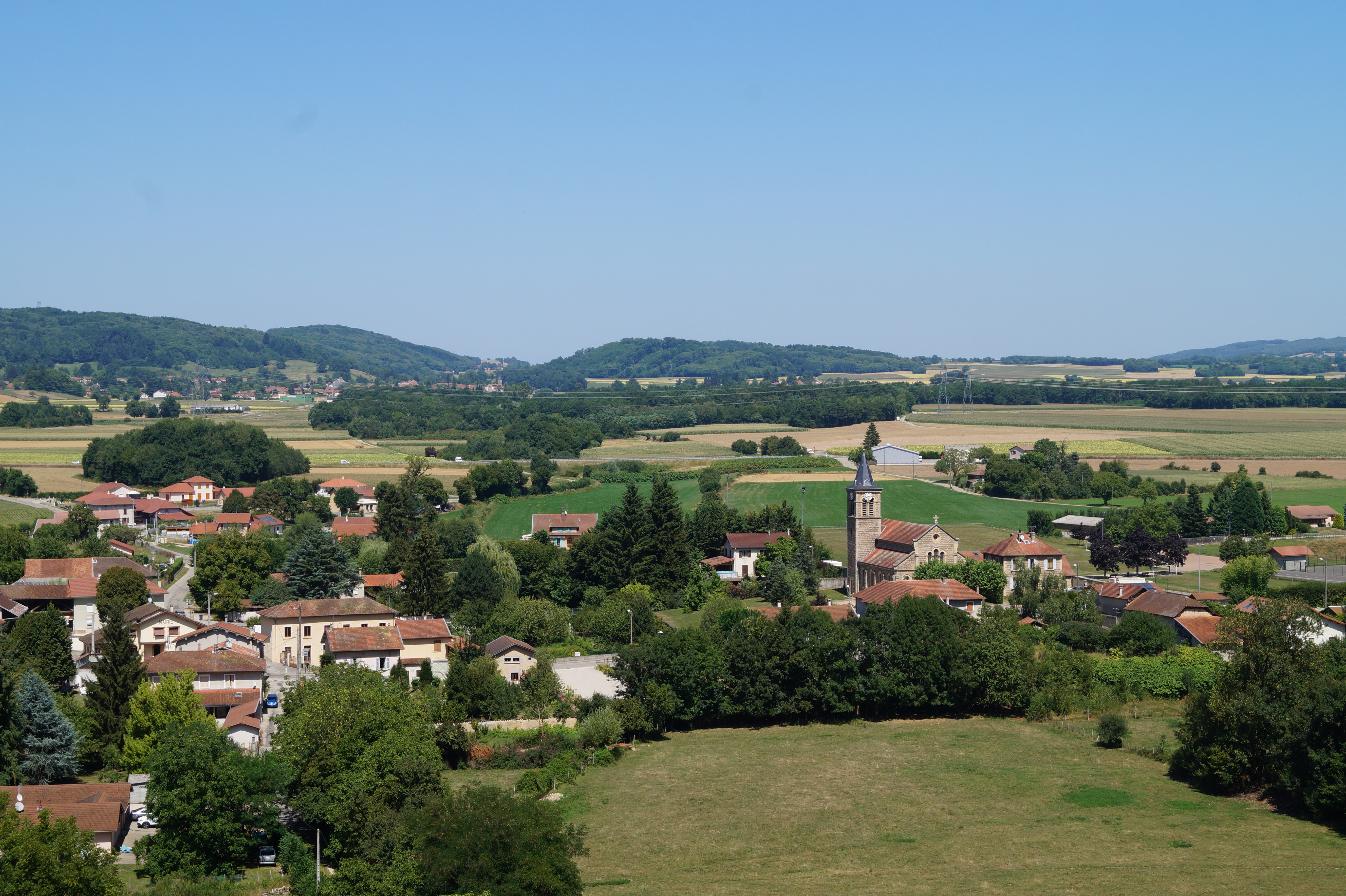 Vue de la colline de Bocsozel du village du Mottier en Isère